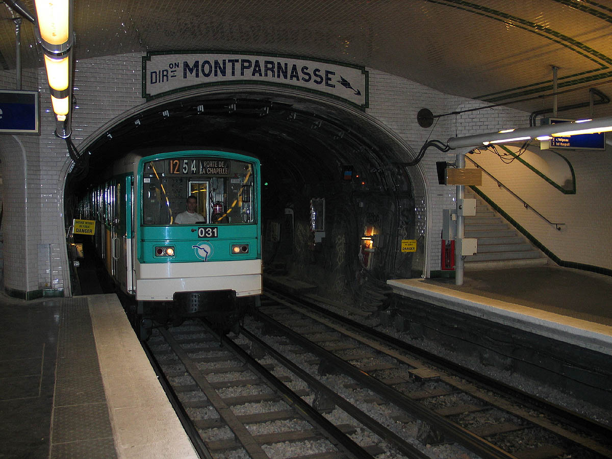 Metro, Sevres-Babylone, Paris, Frankreich, France Photograph Luidger (27. August 2005)